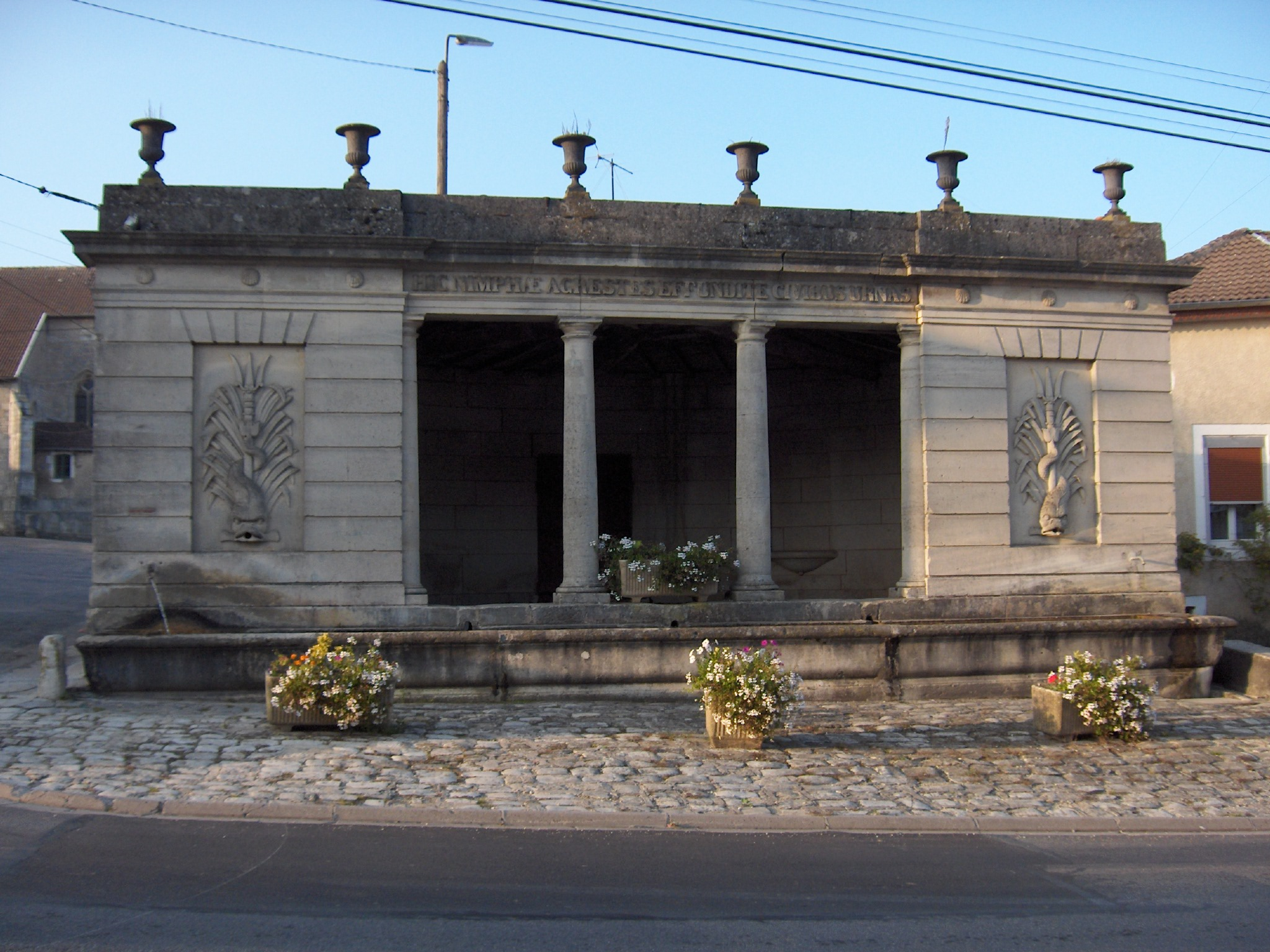 Lavoir à Houdelaincourt (Meuse, France)